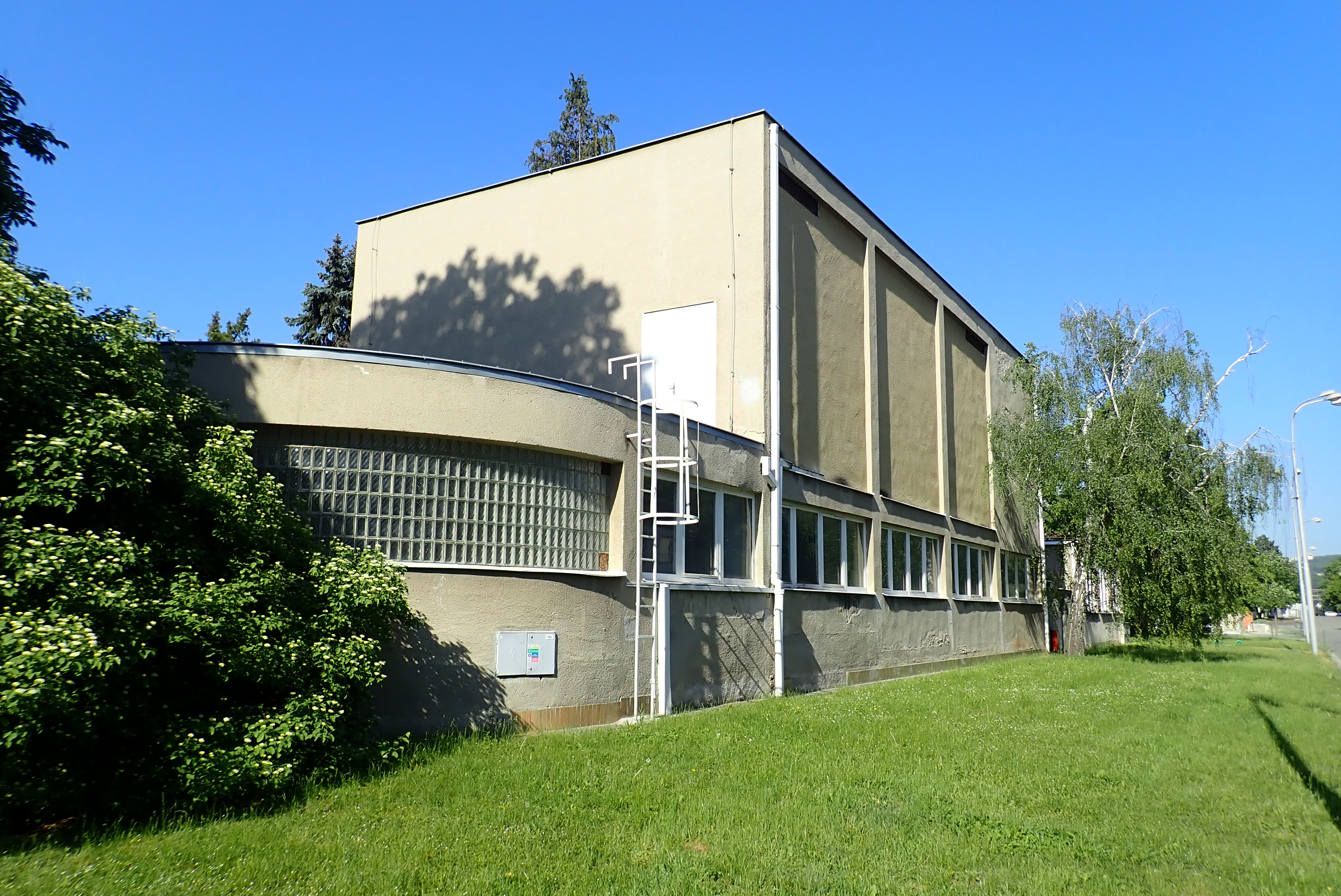 Pavilon AVU